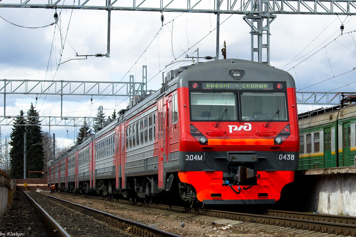 Построен в восьмивагонной составности. С завода имел корпоративную серо-красную окраску РЖД. Вагоны имеют прислонно-сдвижные автоматические двери для выхода на низкие платформы, систему кондиционирования, межвагонные переходы, аналогичные серии ЭД4МКМ-АЭРО а также измененную маску кабин головных вагонов. С завода поступил в филиал Санкт-Петербург-Финляндский Октябрьской ж. д.